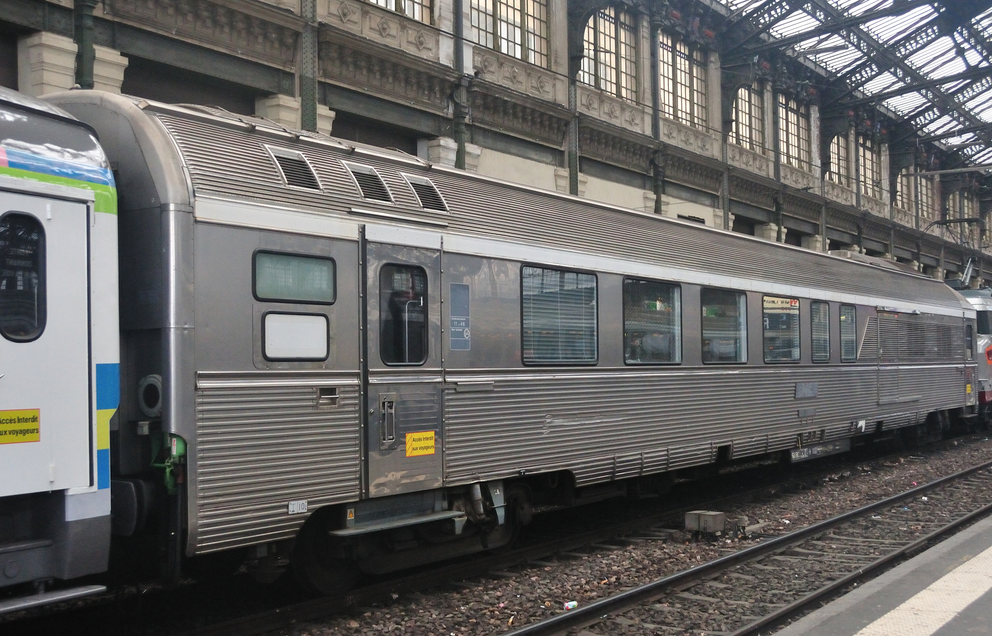 Fourgon Générateur Mistral 69, B3tux N° 6 387 89-89093-3, 1974